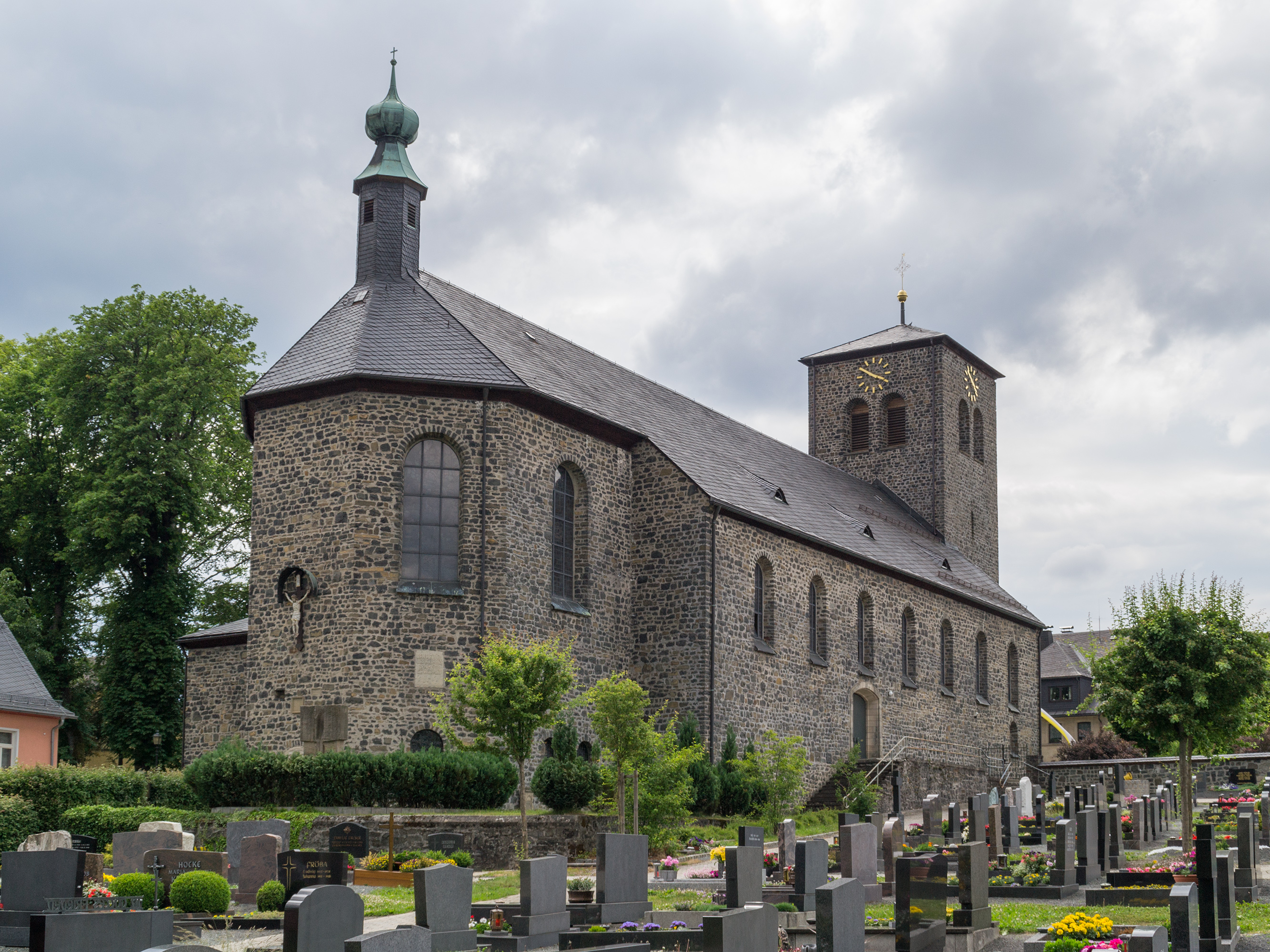 Stadtpfarrkirche Mariä Himmelfahrt in Teuschnitz